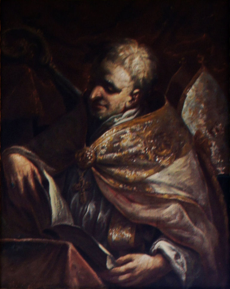 Porträtgemälde von Paul von Jägerndorf, Fürstbischof von Freising, im Fürstengang zwischen Fürstbischöflicher Residenz und Freisinger Dom.